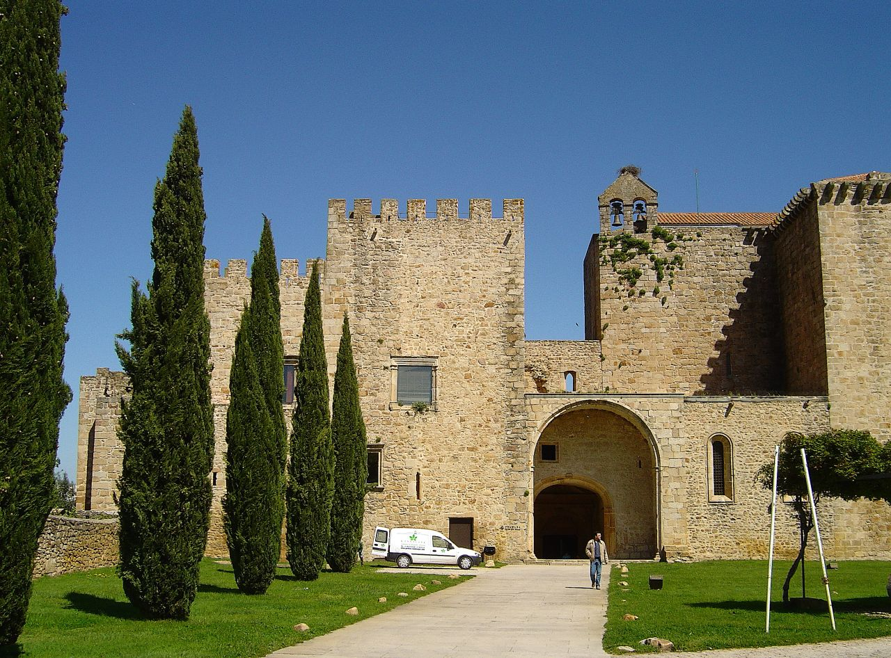 Aqui funciona uma das Pousadas de Portugal